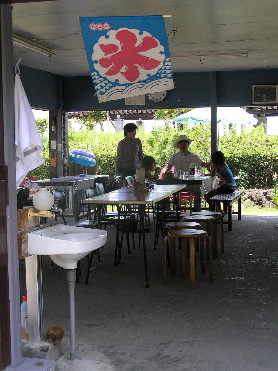 海の家（高知）Ｐhoto by 松岡明芳